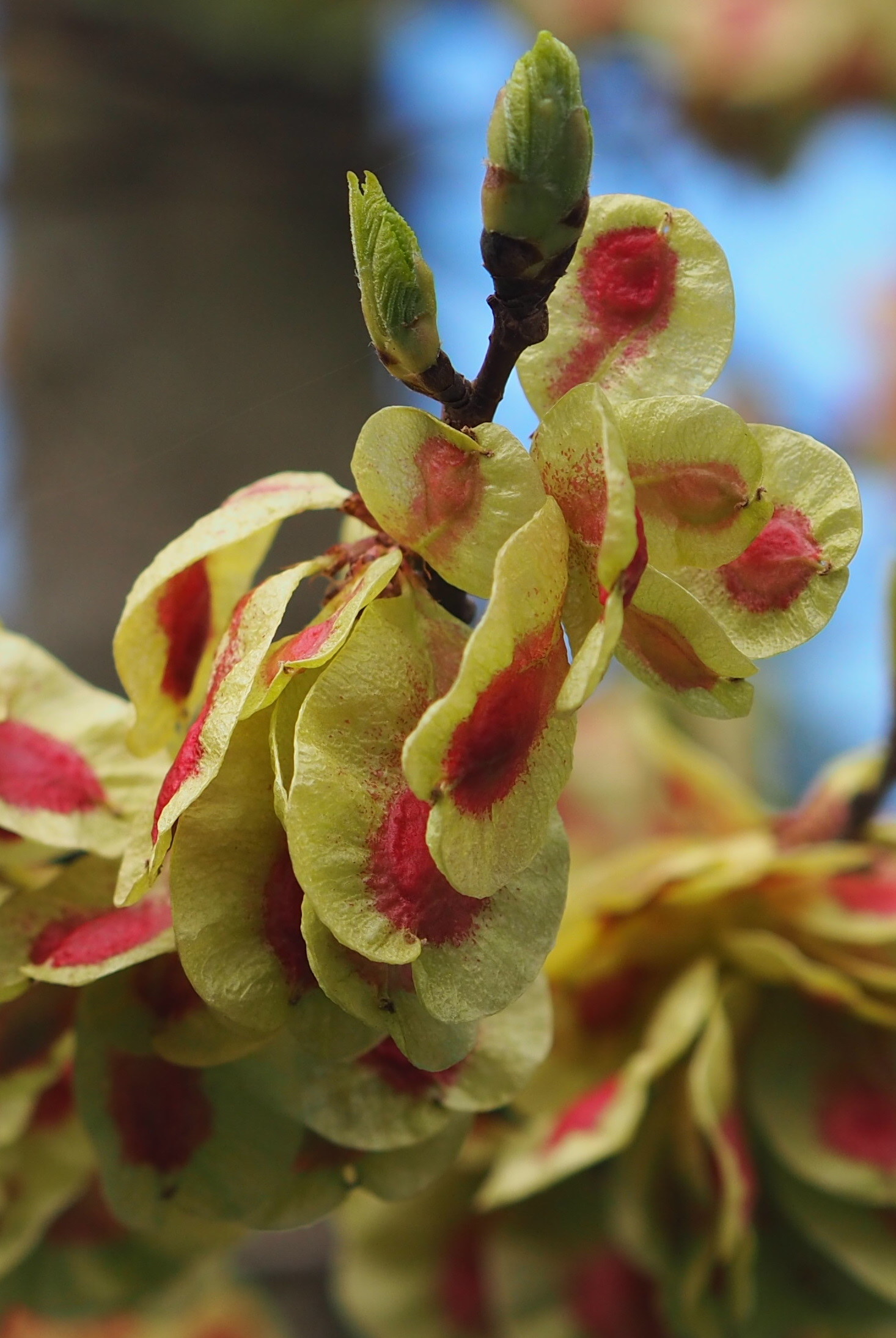 Infrutescences de l'orme champêtre, photographiées en avril 2016